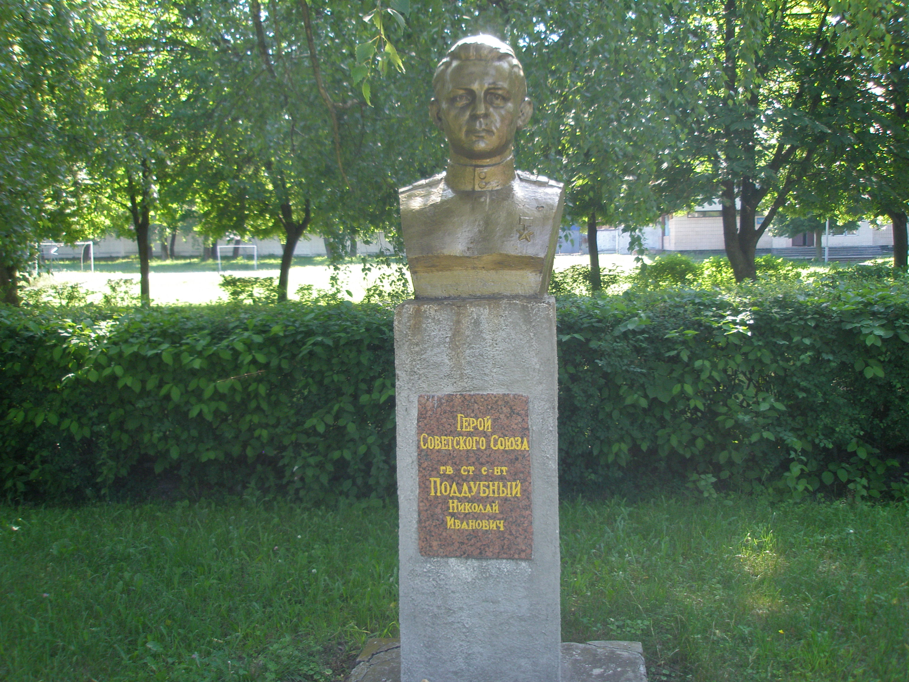 Бюст гвардии старшему сержанту Поддубному Николаю Ивановичу